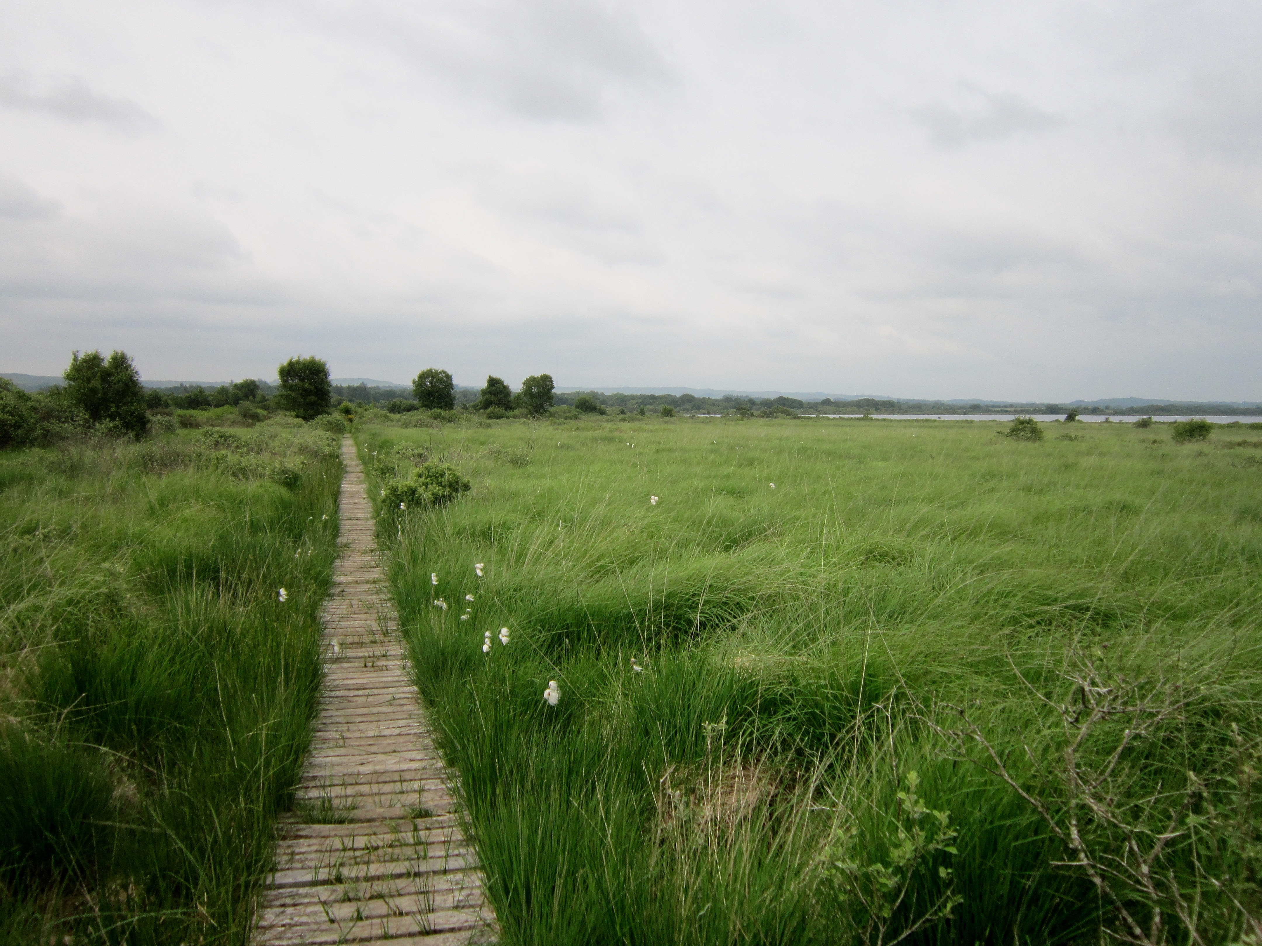 Sentier de randonnée dans le marais du Yeun Elez au pied du mont Saint-Michel de Brasparts. Le lac Saint-Michel (ou lac de Brennilis) est visible à la droite d ela photo. La plante à fleurs blanches visible le long du sentier est la linaigrette.